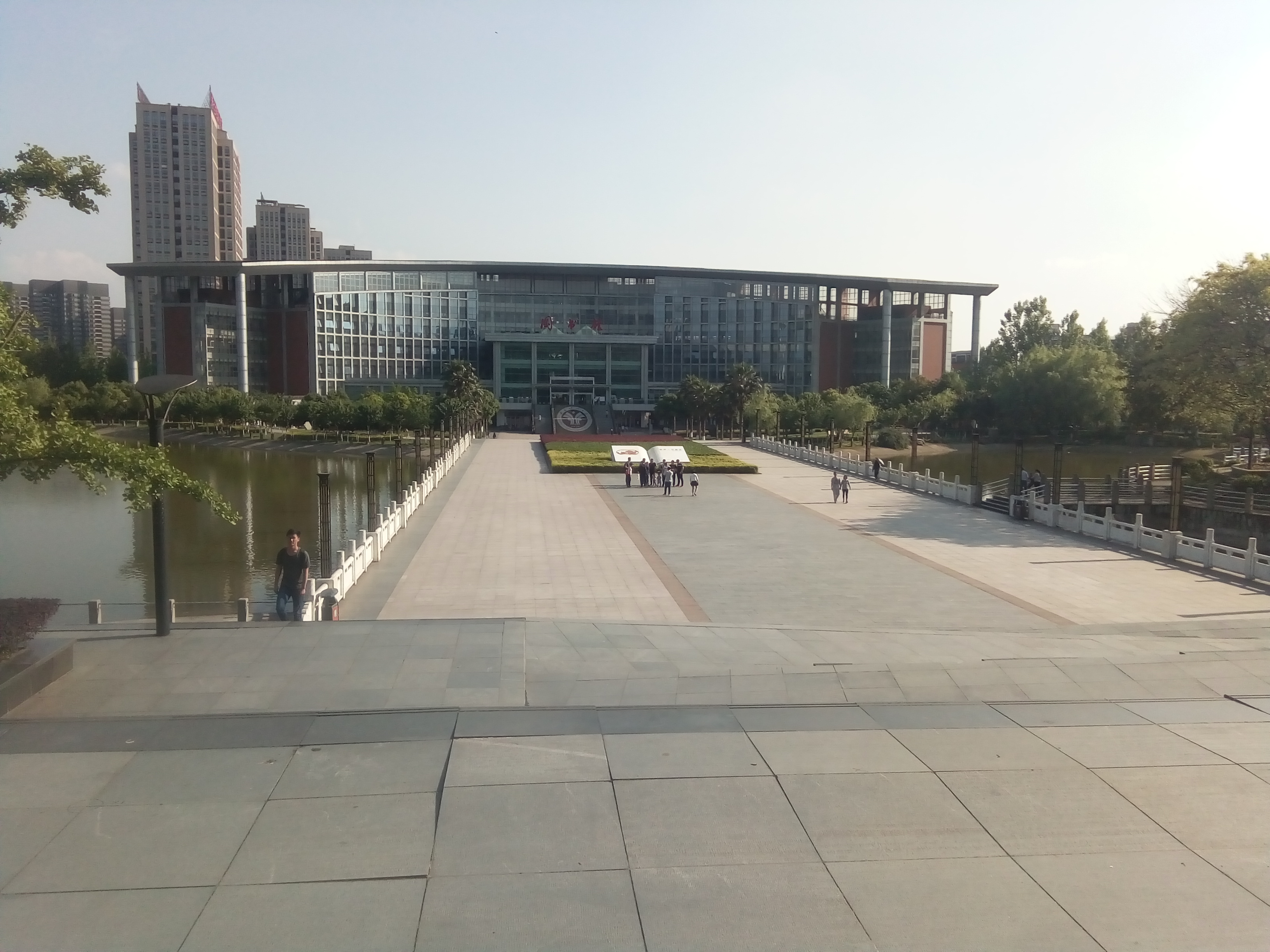 西政图书馆，摄于2017年4月